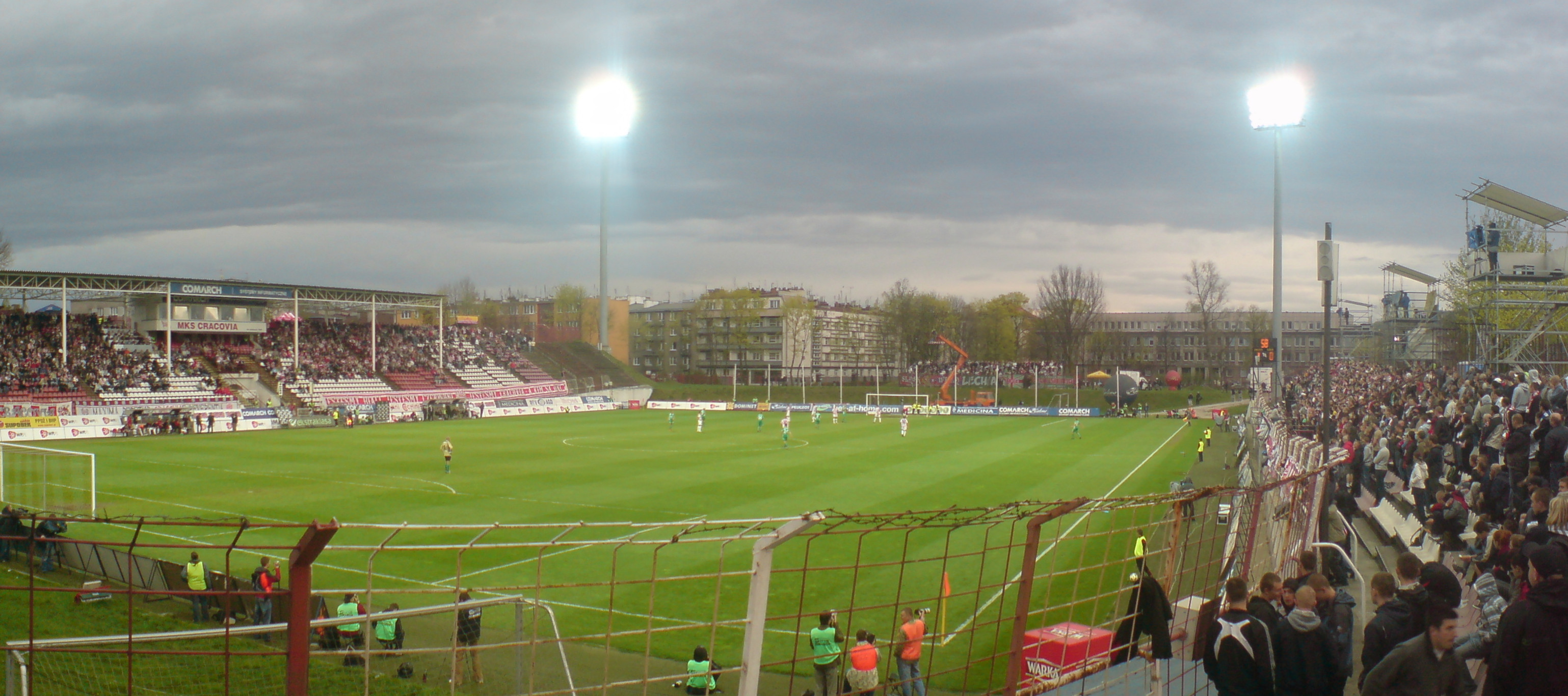 Piątek, 17.04.2009, godz. 17:45 - 24. kolejka Polskiej Ekstraklasy: Cracovia Kraków - Śląsk Wrocław 1:1 (1:0)